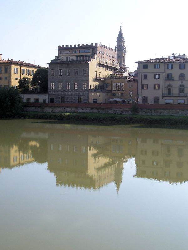 Arno River, Firenze, Italy